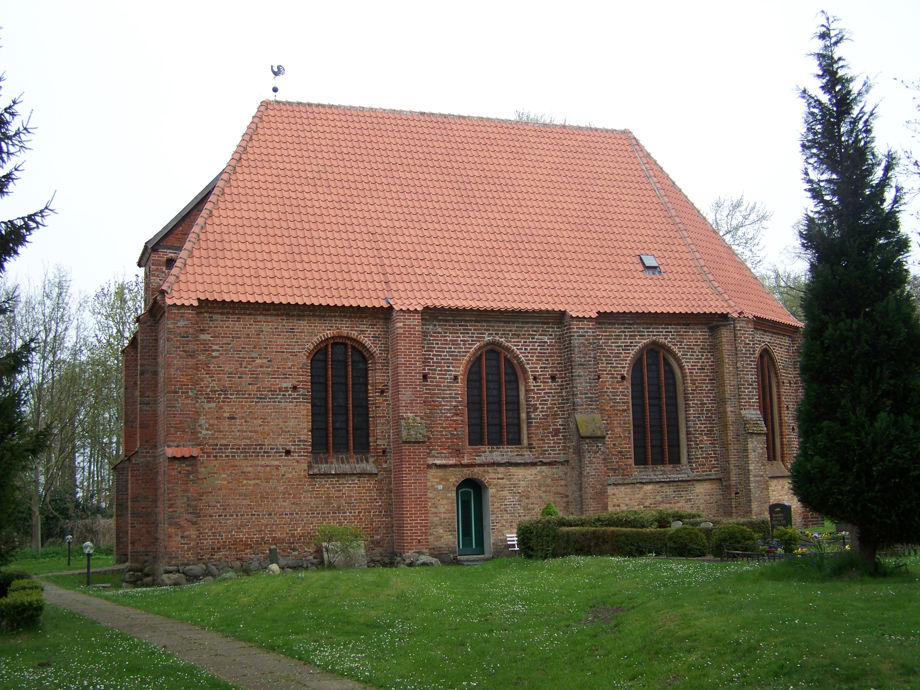 Kirche in Bodstedt (2008-05-01)